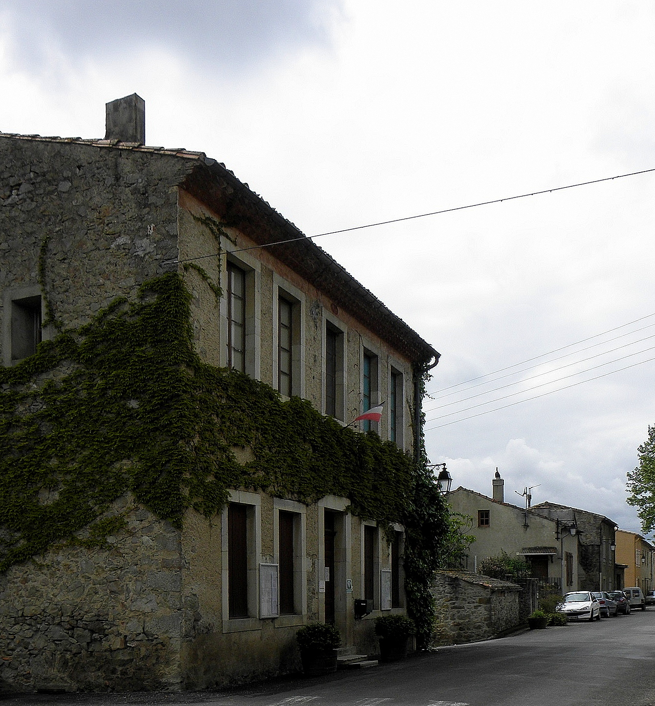 Mairie de Saint-Polycarpe (11).